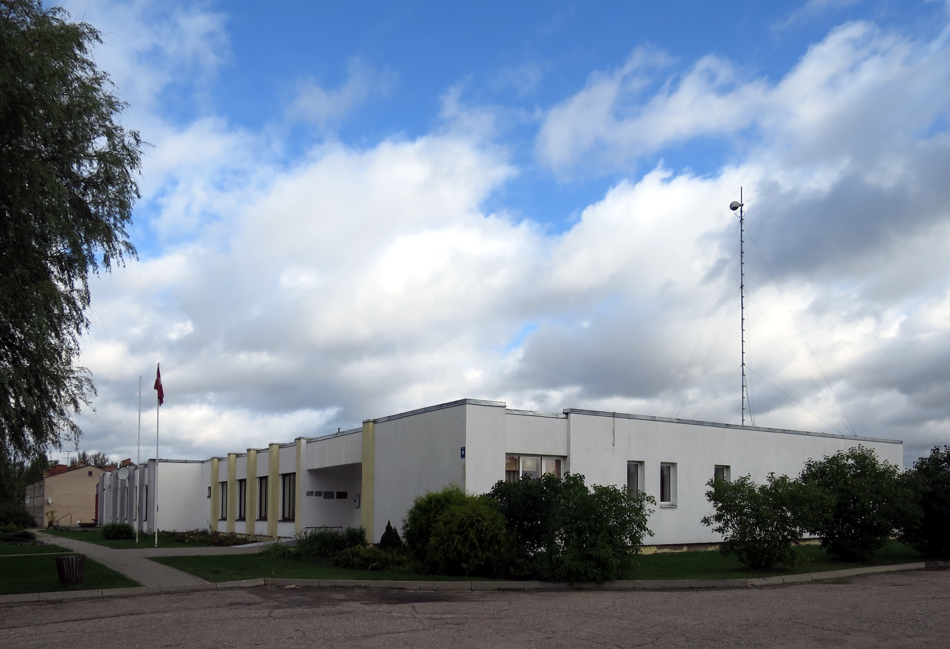 Staru pagasta pārvalde un kultūras nams